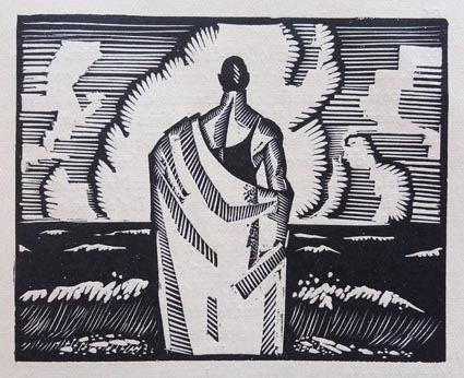 RYLSKY (dit aussi Ahü, 1901-1970), xylographie publiée en 1926